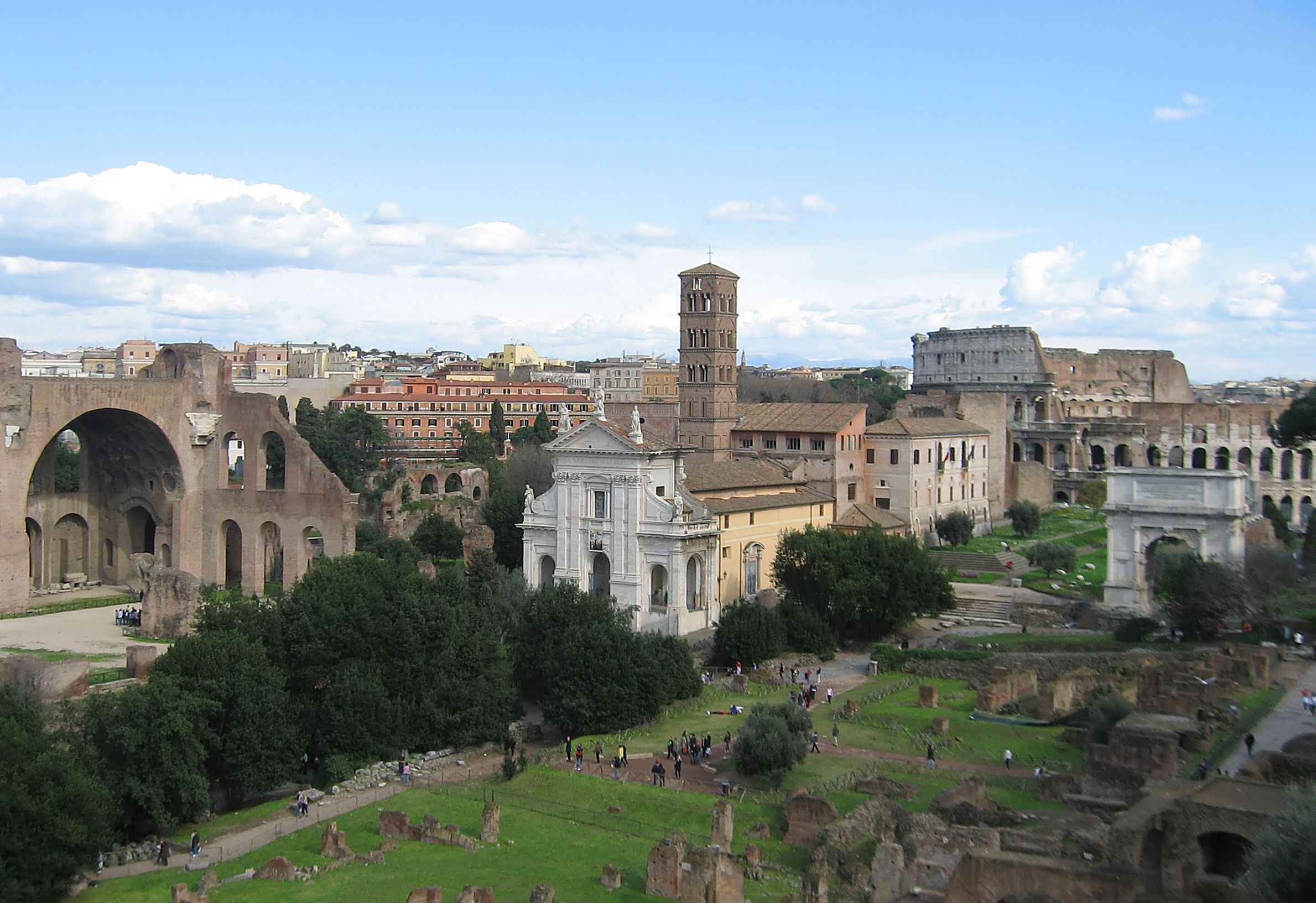 Rom/Italien - Blick vom Palatin auf den vorgelagerten kleinen Hügel Velia mit der Maxentiusbasilika, dem Titusbogen und (verdeckt) den Resten des Tempels der Venus und der Roma; Im Hintergrund steht das Kolosseum.